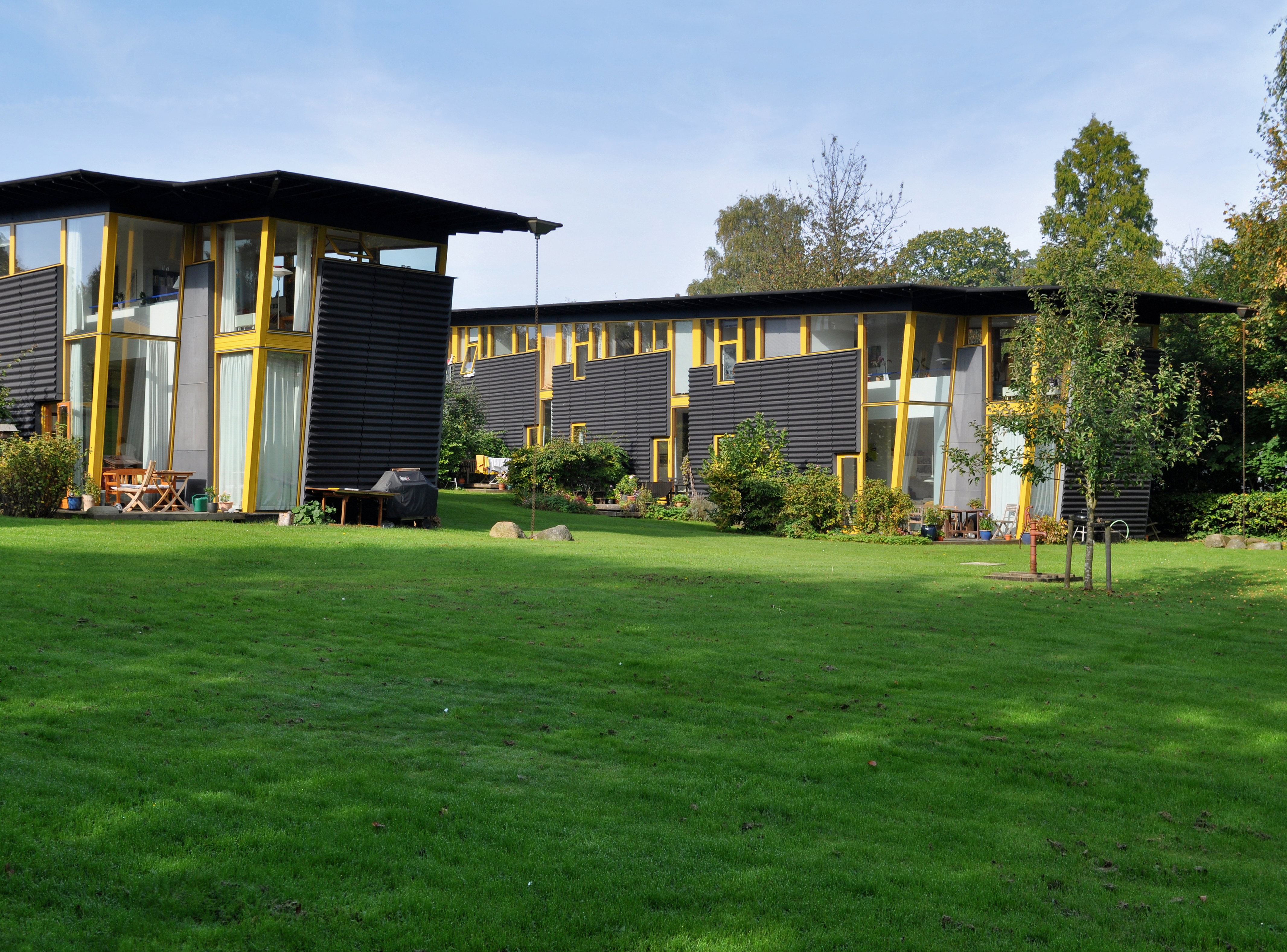 birkerød søhuse, birkerød, copenhagen, denmark 1994-1995. architects: tegnestuen vandkunsten. the vandkunsten set.